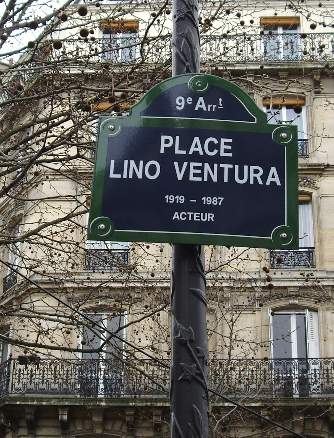 Place Lino-Ventura, Paris 9e.